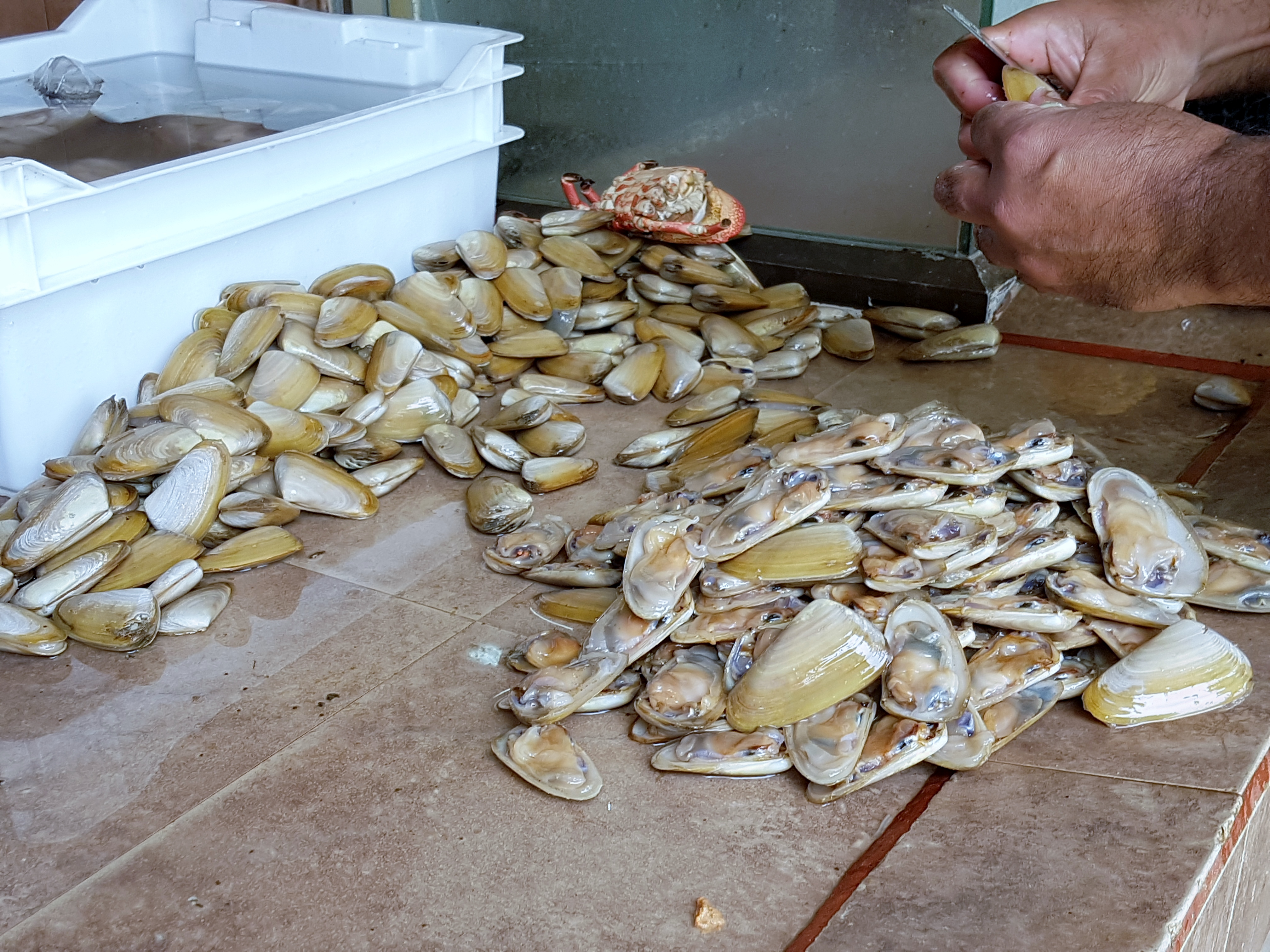 Abriendo machas en el Chiringuito de Zapallar, Chile.